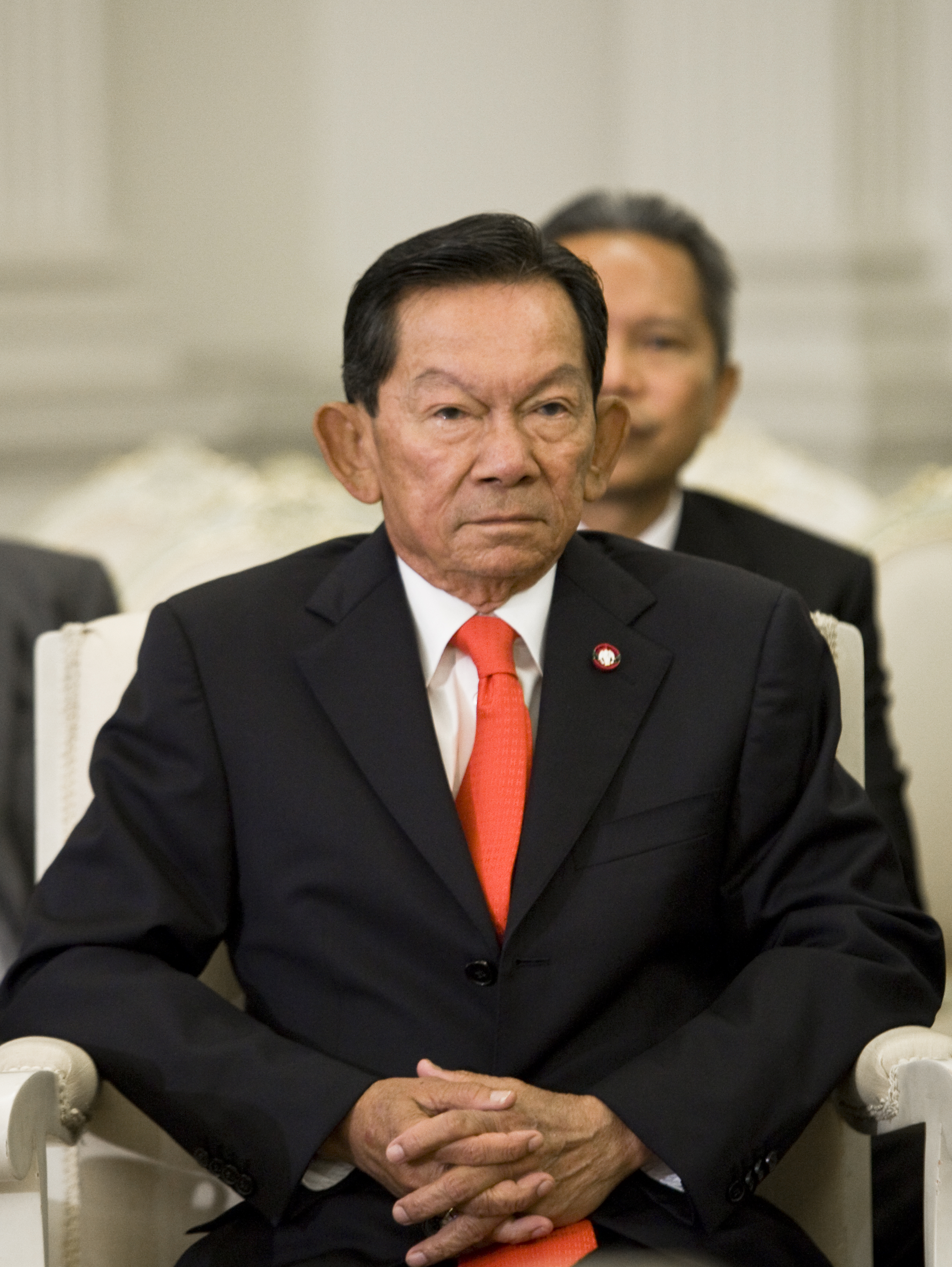 พลตรี สนั่น ขจรประศาสน์ / สำนักนายกรัฐมนตรี จัดแถลงผลงานของรัฐบาล ในวาระที่รัฐบาลทำงานครบ 6 เดือน(มกราคม-มิถุนายน 2552) ณ ตึกสันติไมตรี ทำเนียบรัฐบาล 6 สิงหาคม 2552 (The Official Site of The Prime Minister of Thailand Photo by พีรพัฒน์ วิมลรังครัตน์)